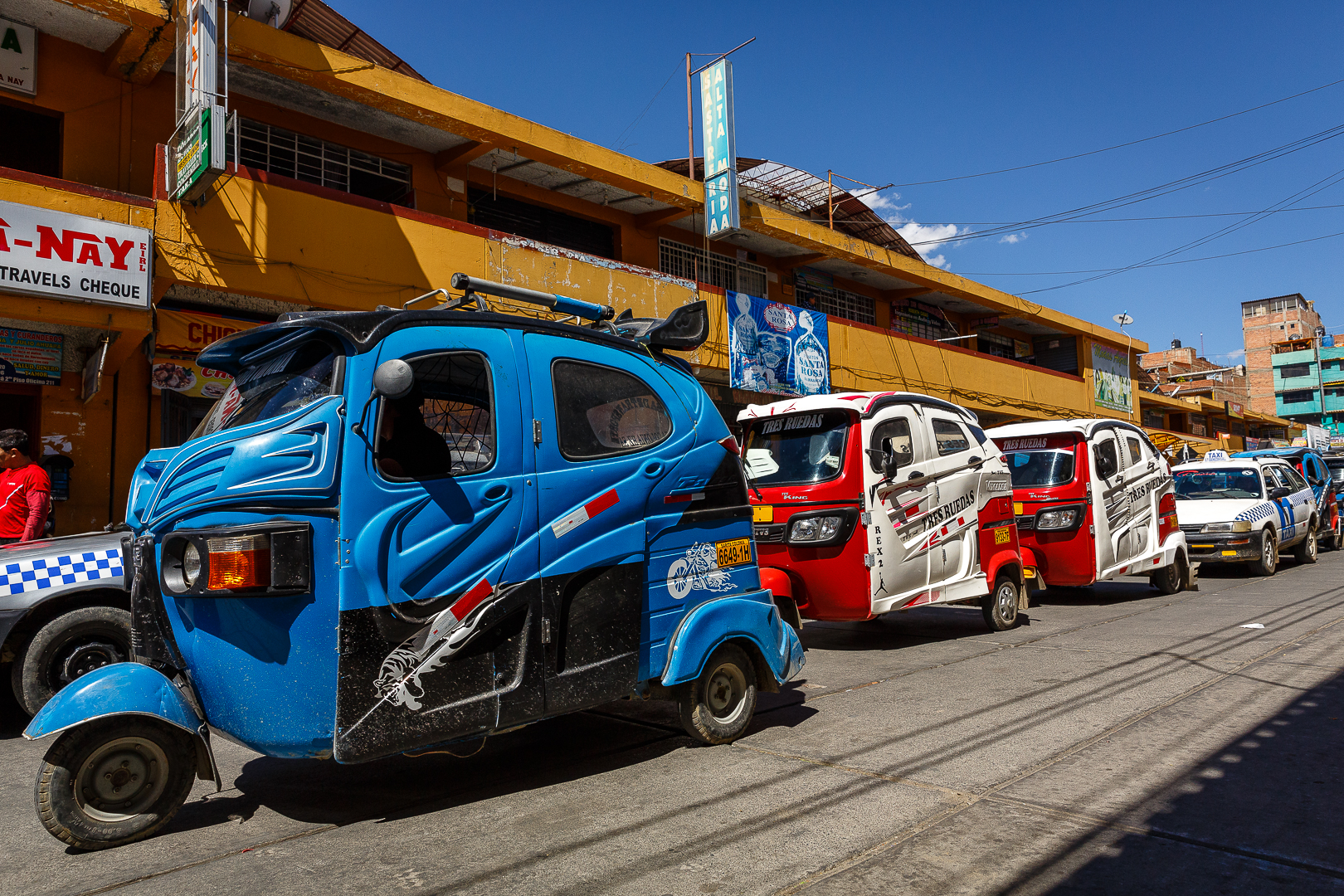 Tuk Tuk, nas ruas de Huaraz, Ancash - Peru.